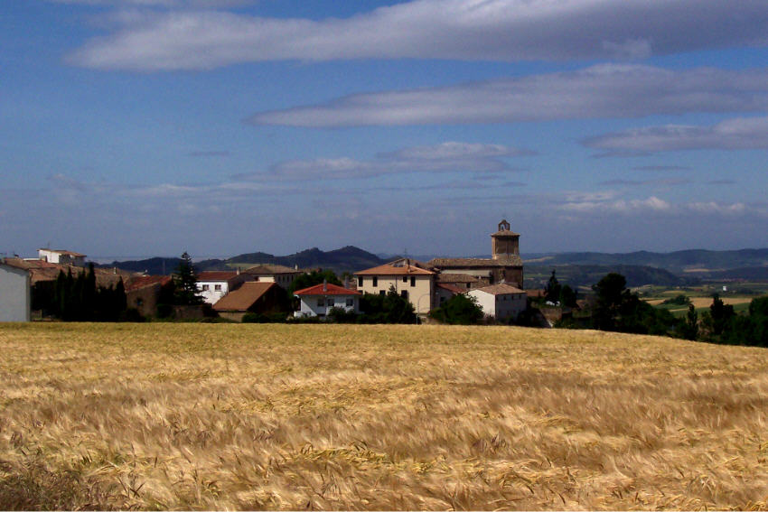 panorama de uterga, pueblo navarro, navarrisches dorf, navarran village